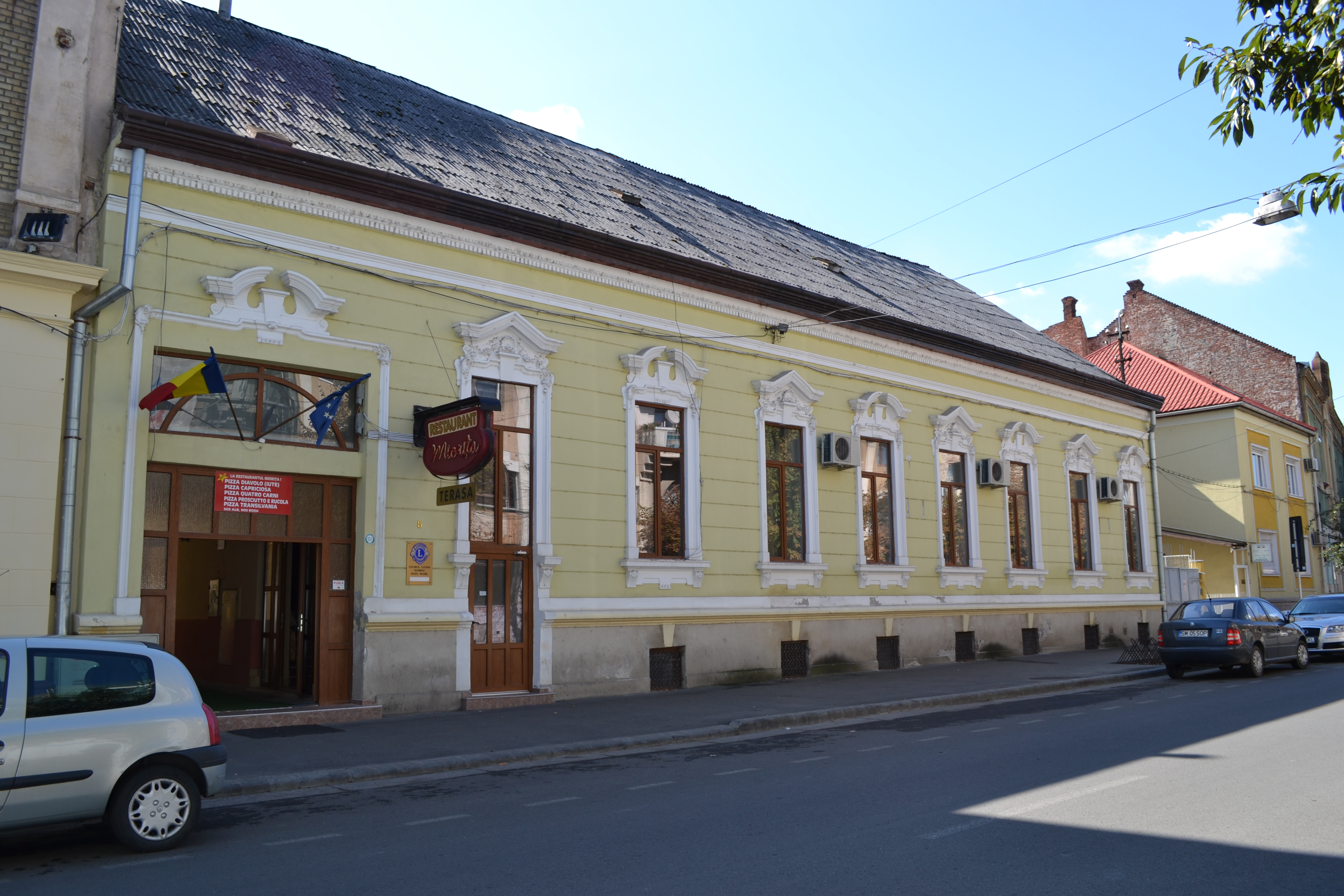 Cazino, azi restaurantul „Miorița”